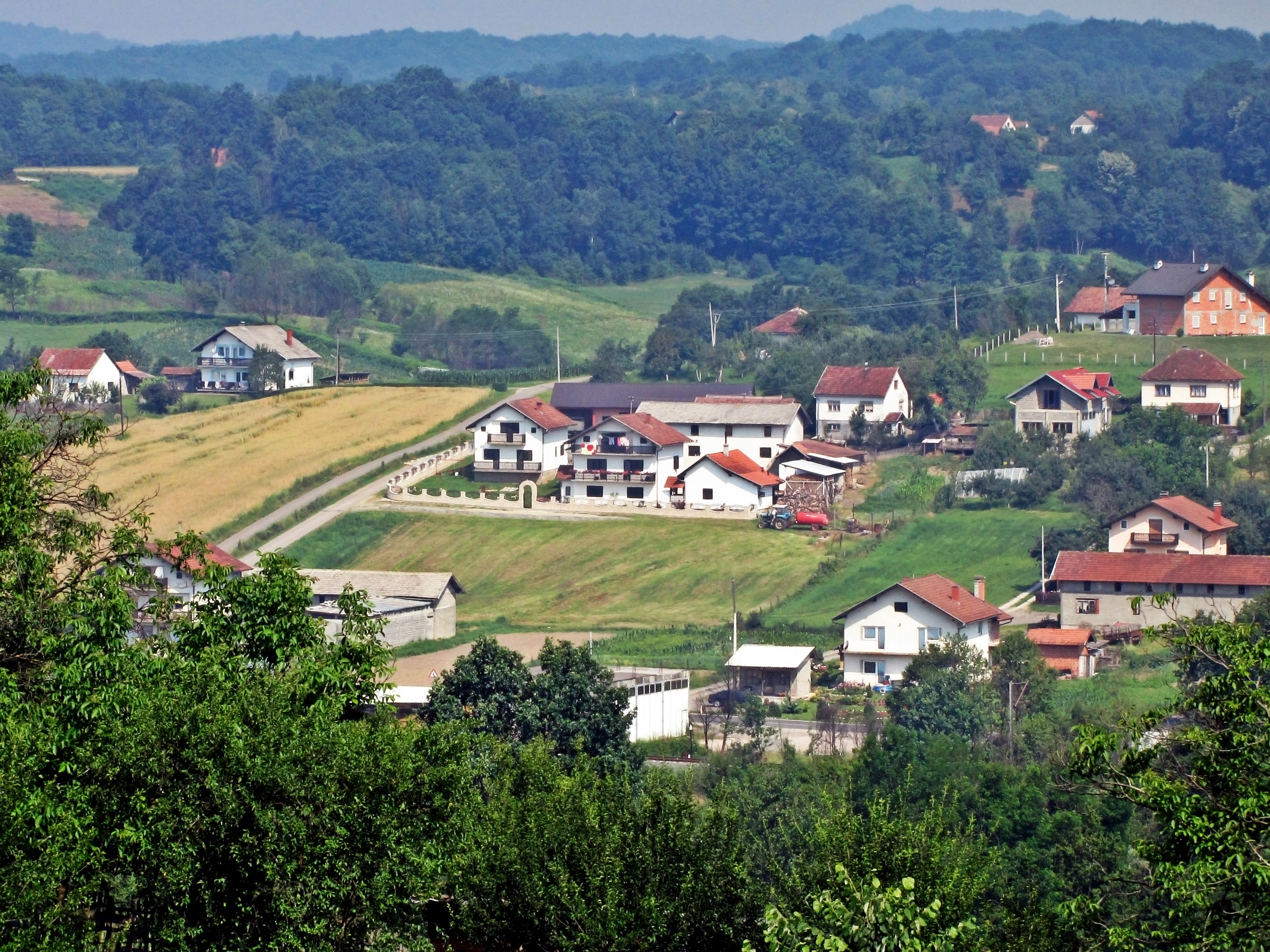 Грабовица (Добој)